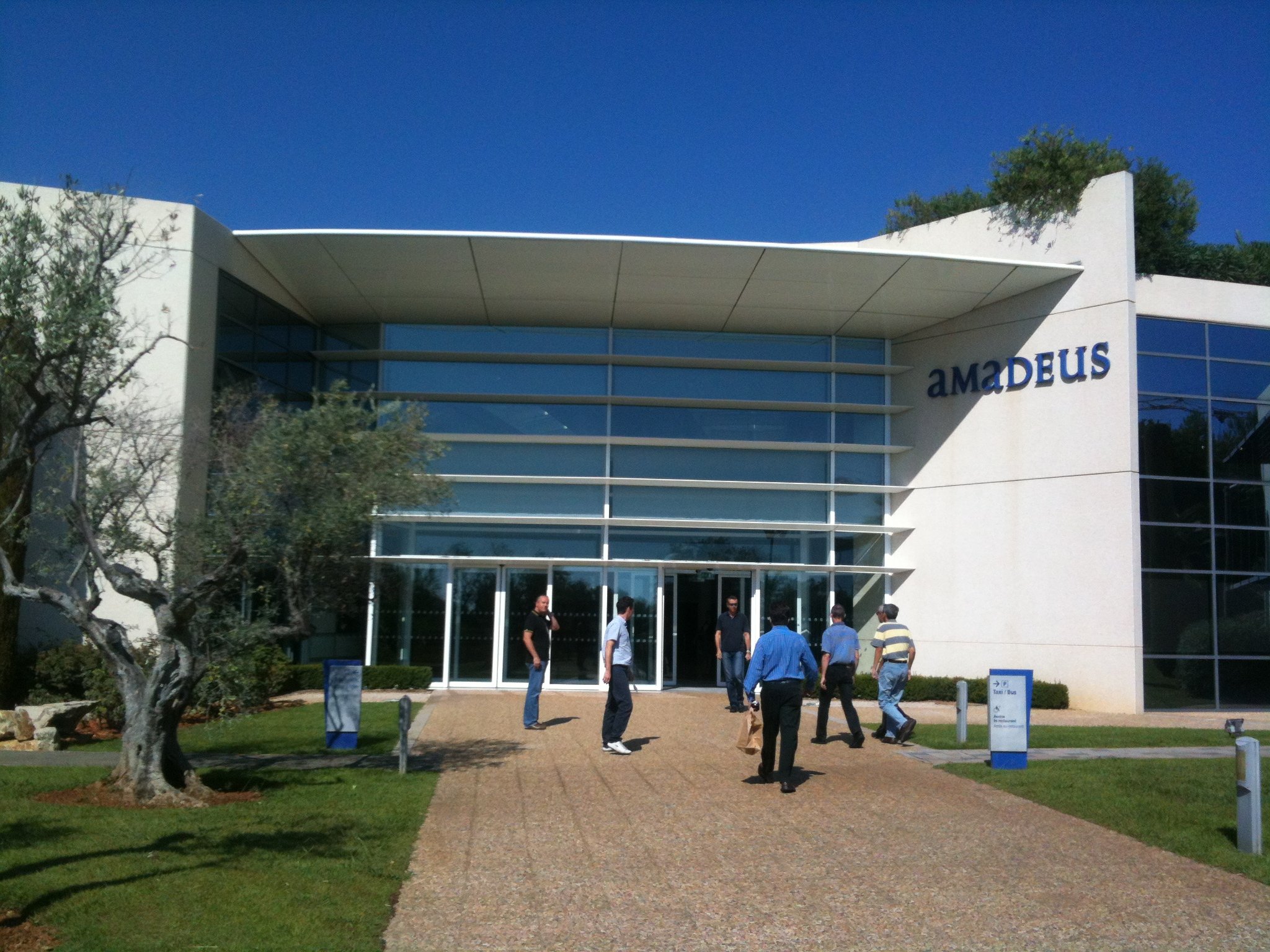 Amadeus, sede di Nizza (Sophia Antipolis): vista degli uffici principali